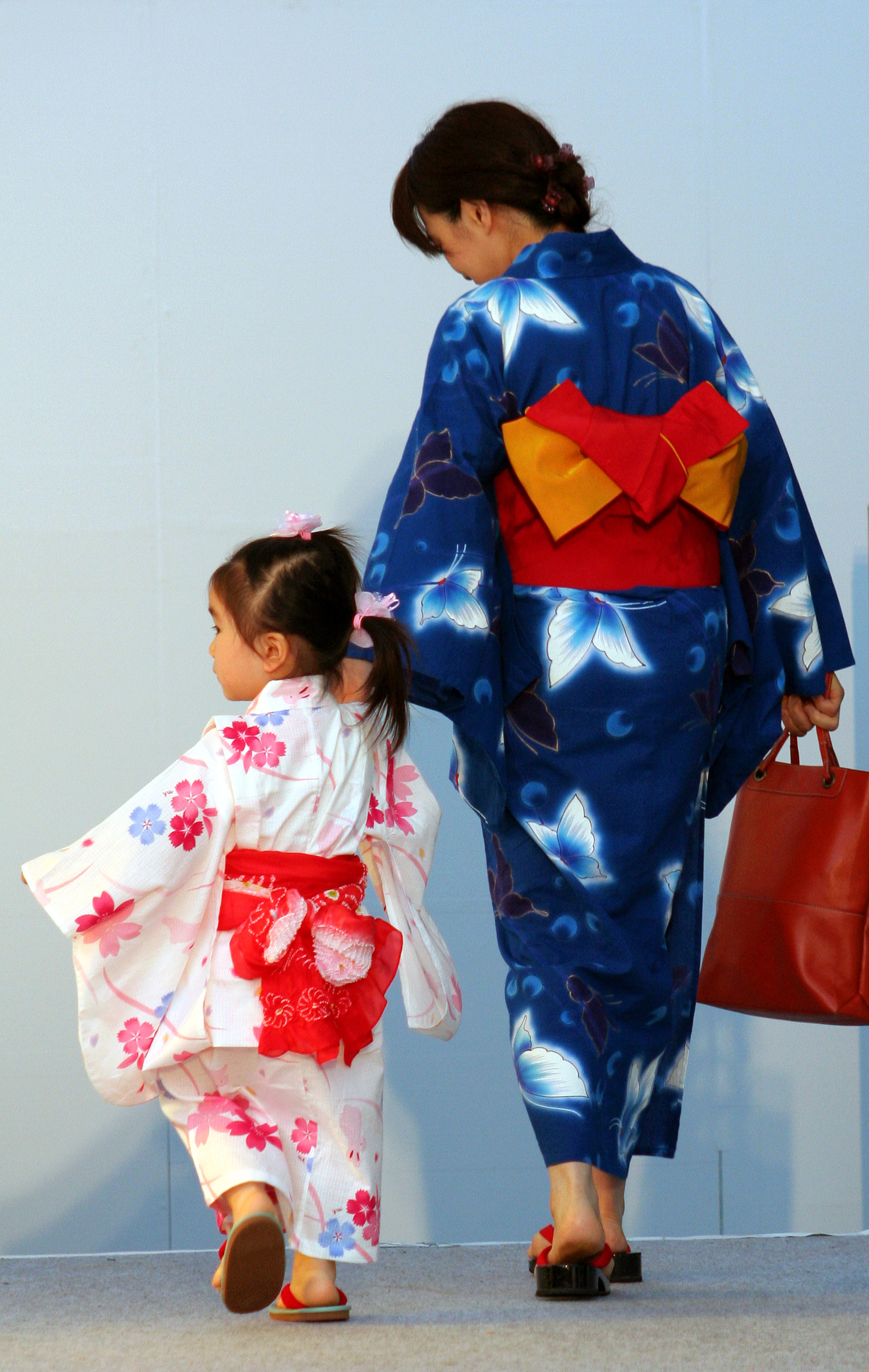 2009年6月22日から23日にかけて、姫路市大手前通りにて開催された「姫路ゆかた祭」。2つ日間にかけて行なわれた祭の風景。注意:ファイル番号及び日時は撮影時系列純にはなっておりません。また、性別、年齢、国籍などによる分類は推定で行なっております。 48の後姿。